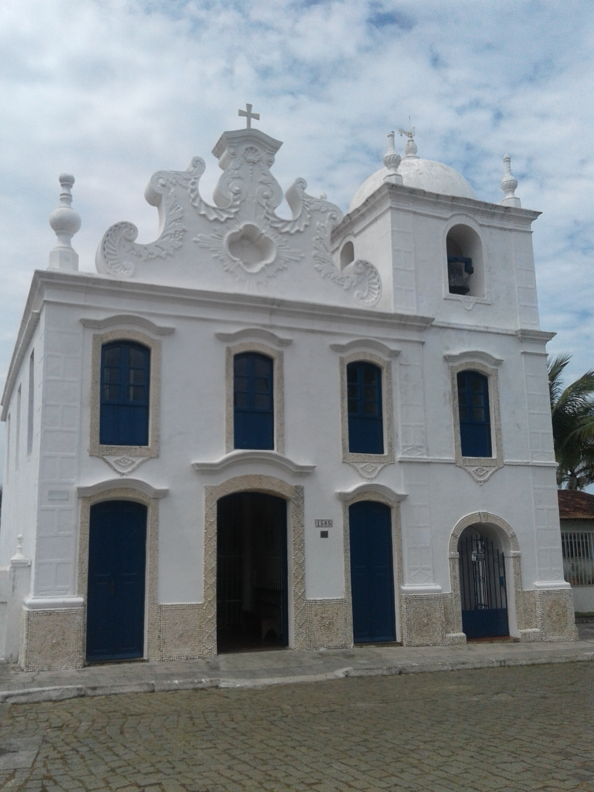 Português do Brasil: Fachada da antiga matriz de nossa senhora da Conceição em Guarapari -ES